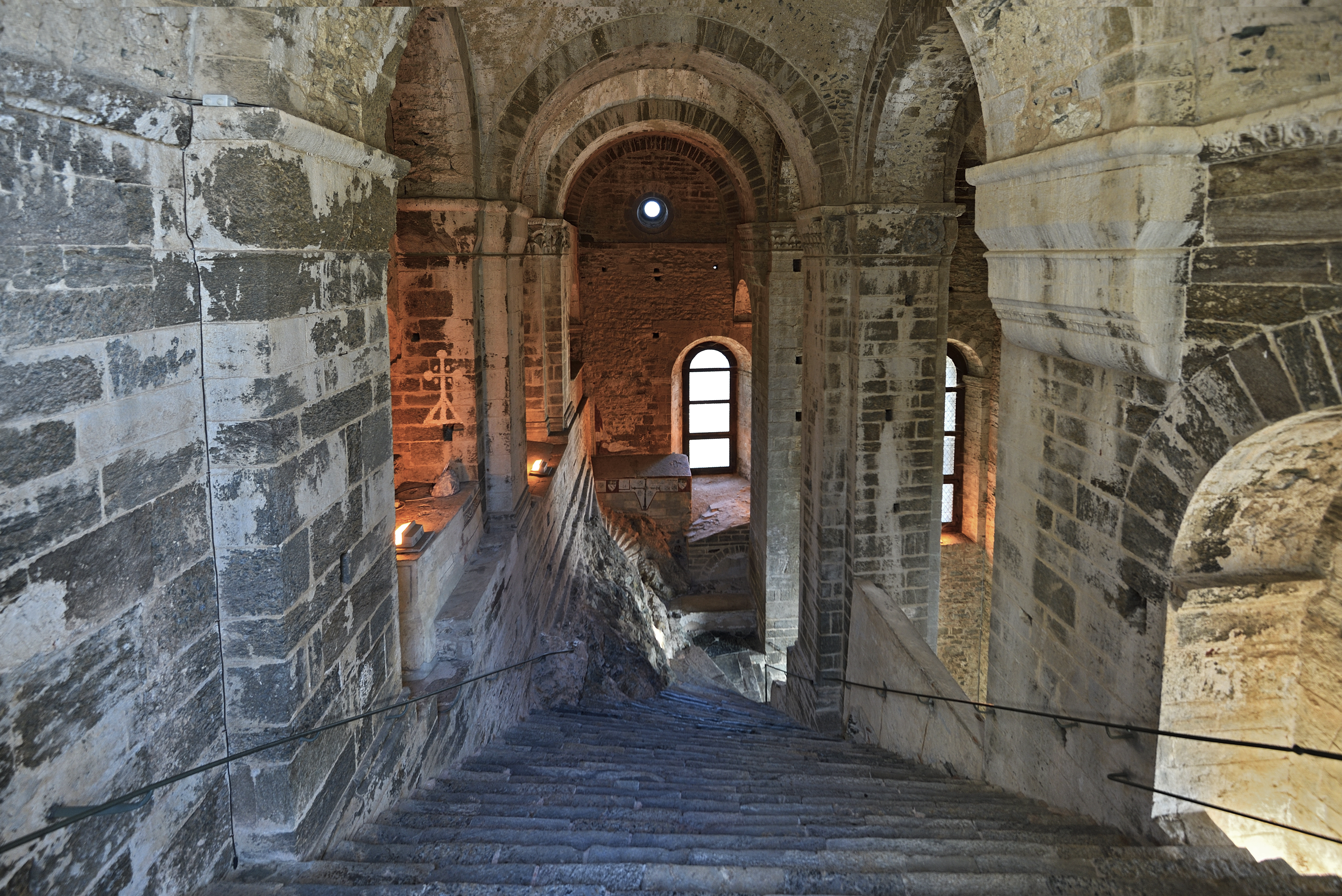 Sacra di San Michele ,è un complesso architettonico arroccato sulla vetta del monte Pirchiriano, all'imbocco della val di Susa, nella Città metropolitana di Torino, in Piemonte. Situato nel territorio del comune di Sant'Ambrogio di Torino, poco sopra la borgata San Pietro, appartiene alla diocesi di Susa. This is a photo of a monument which is part of cultural heritage of Italy.